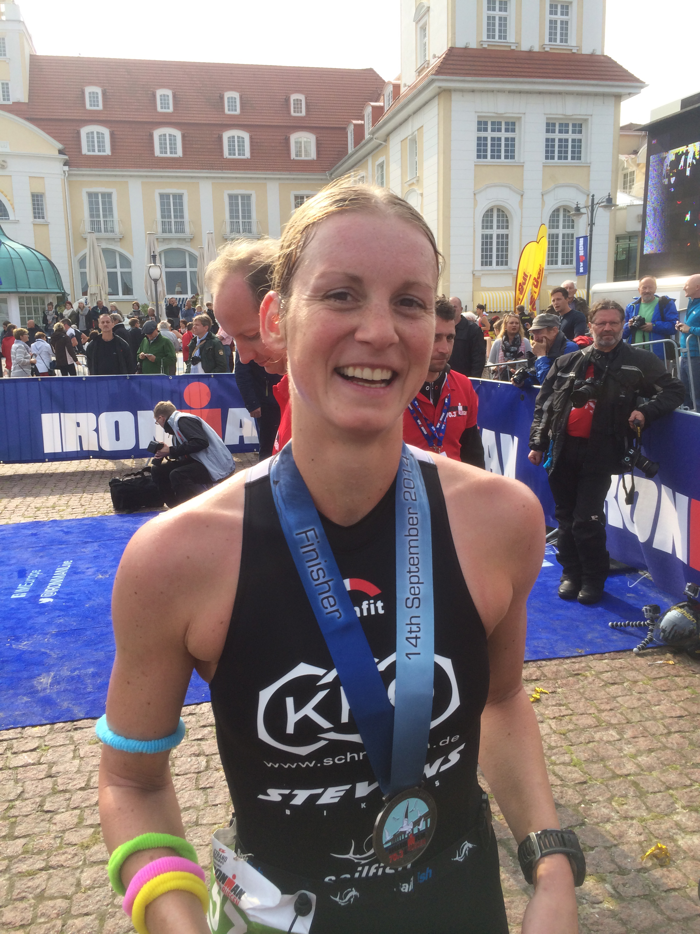 Verena Walter IRONMAN 70.3-Rügen 2014